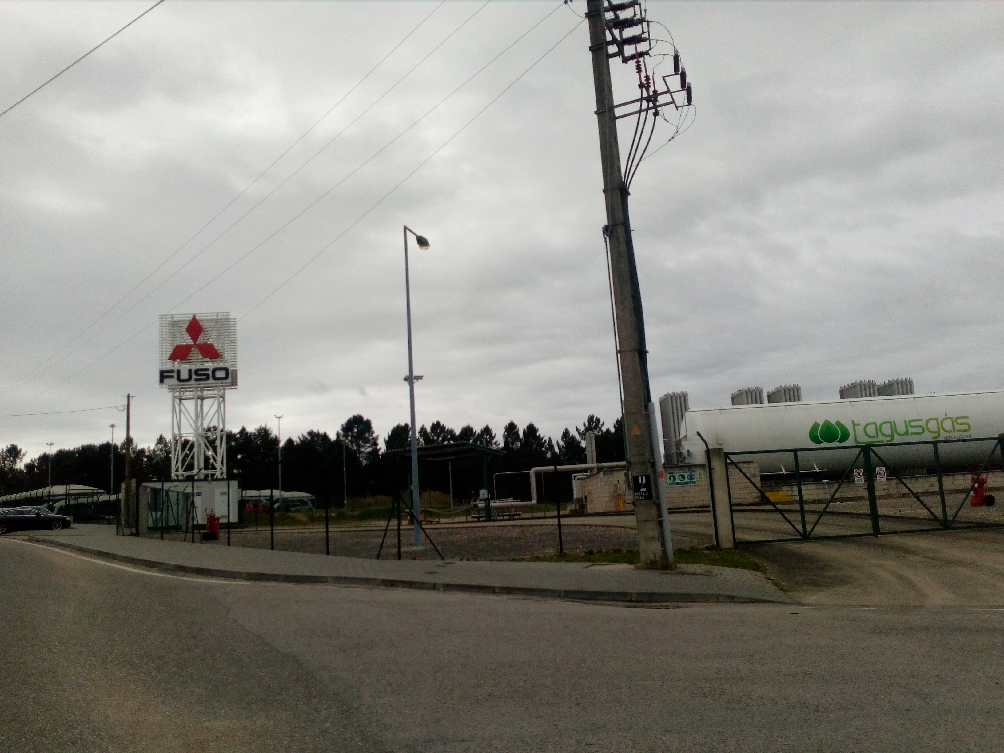 Instalações da Mitsubishi Fuso em Tramagal (antigas instalações de fabrico do modelo Berliet Tramagal)